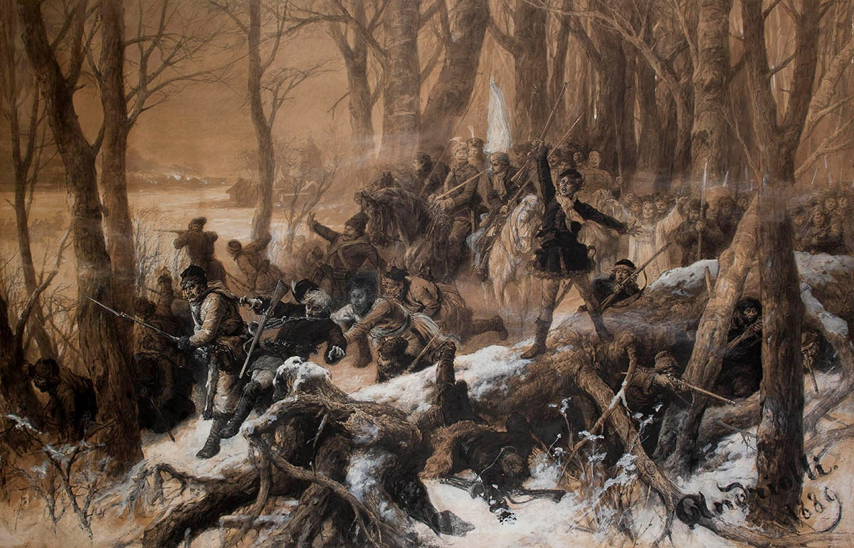 Scena z powstania listopadowego na Litwie (Emilia Plater)